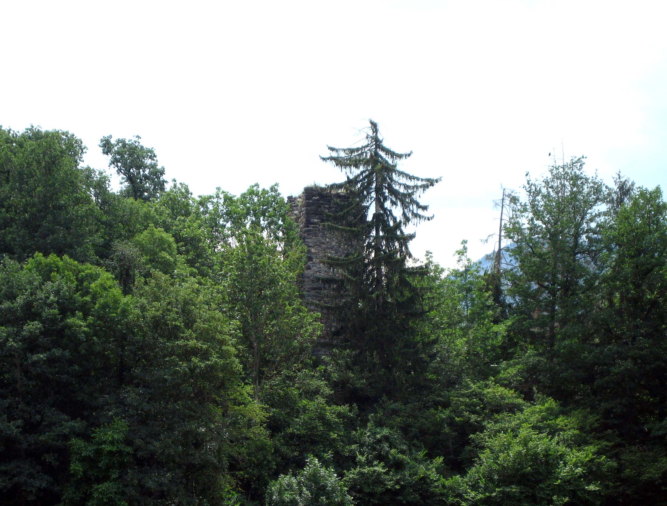 Lage